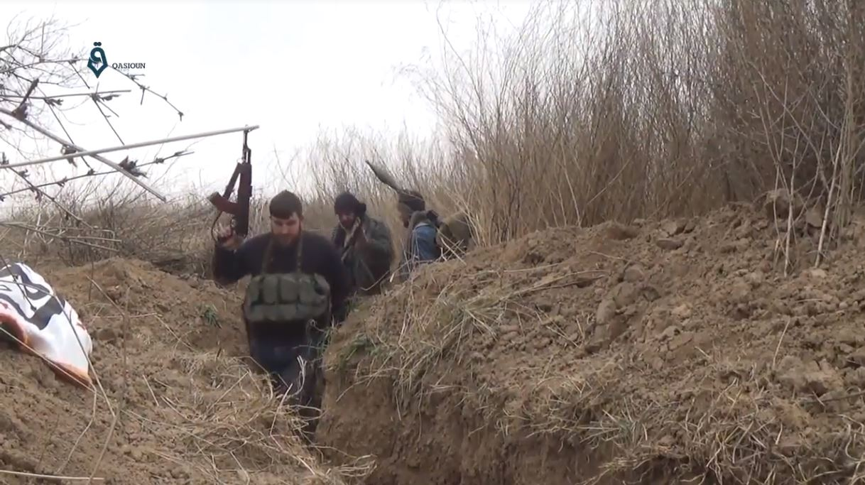 Rebelles de Jaych al-Islam à al-Marj, dans la Ghouta orientale, lors de la guerre civile syrienne, le 13 février 2017.